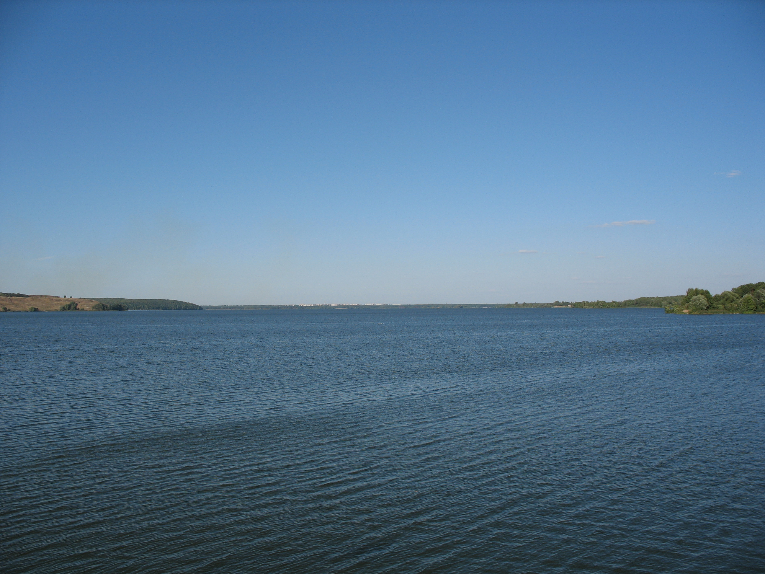 Воронежское водохранилище с плотины